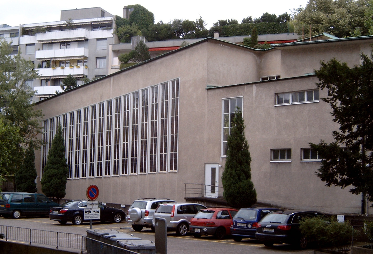 Versammlungsraum der First Church of Christ, Scientist in Basel, 1935/36, Architekt: Otto Rudolf Salvisberg